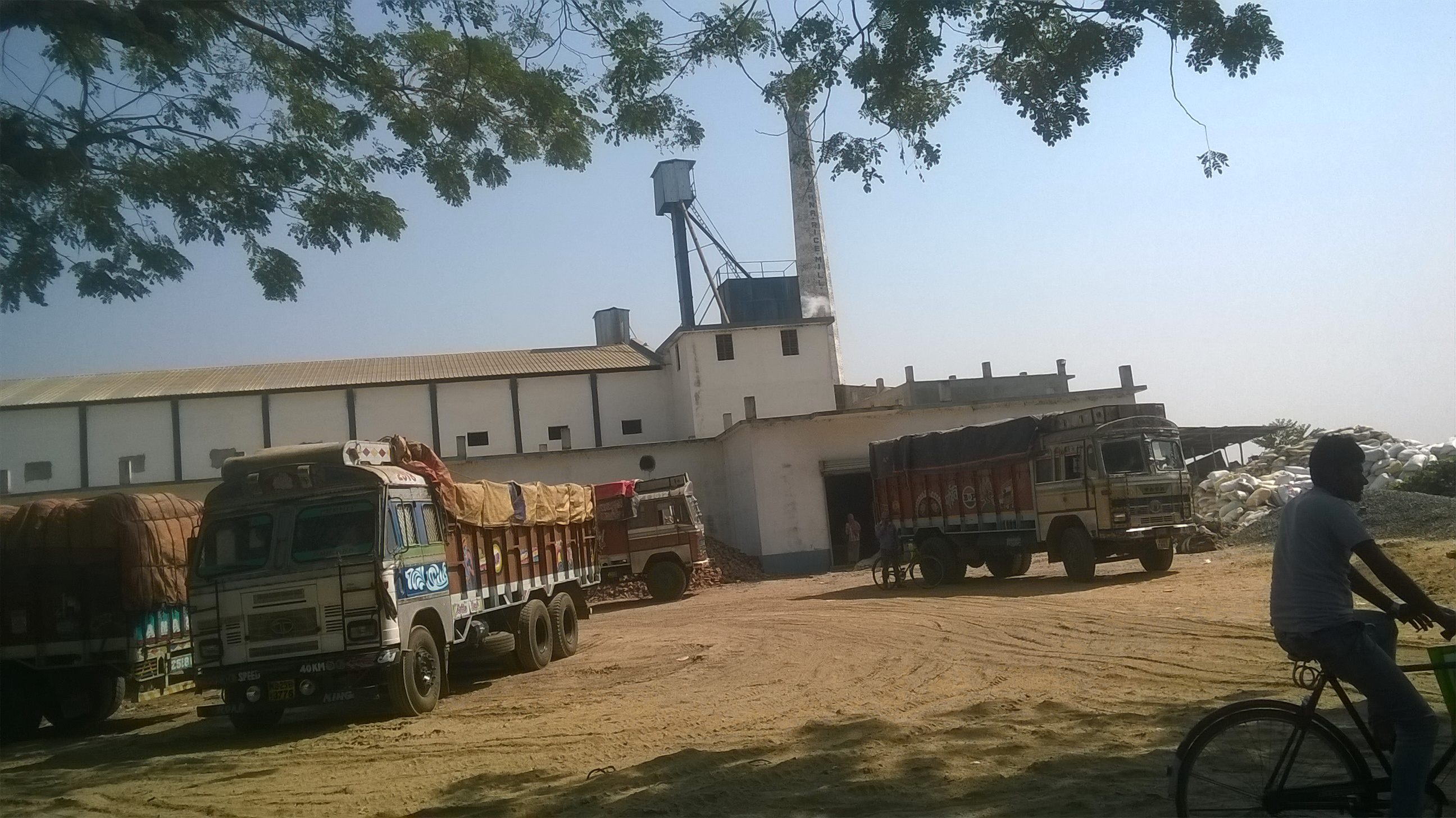 যশোর রোড , বনগাঁ